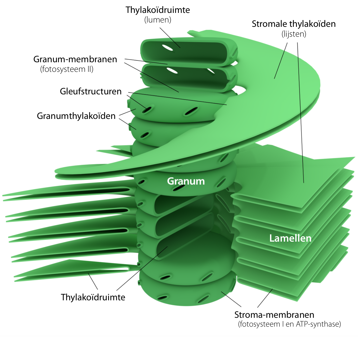 PNG-weergave van een stapel thylakoïden (granum). Gemodelleerd en gerendered in Blender.